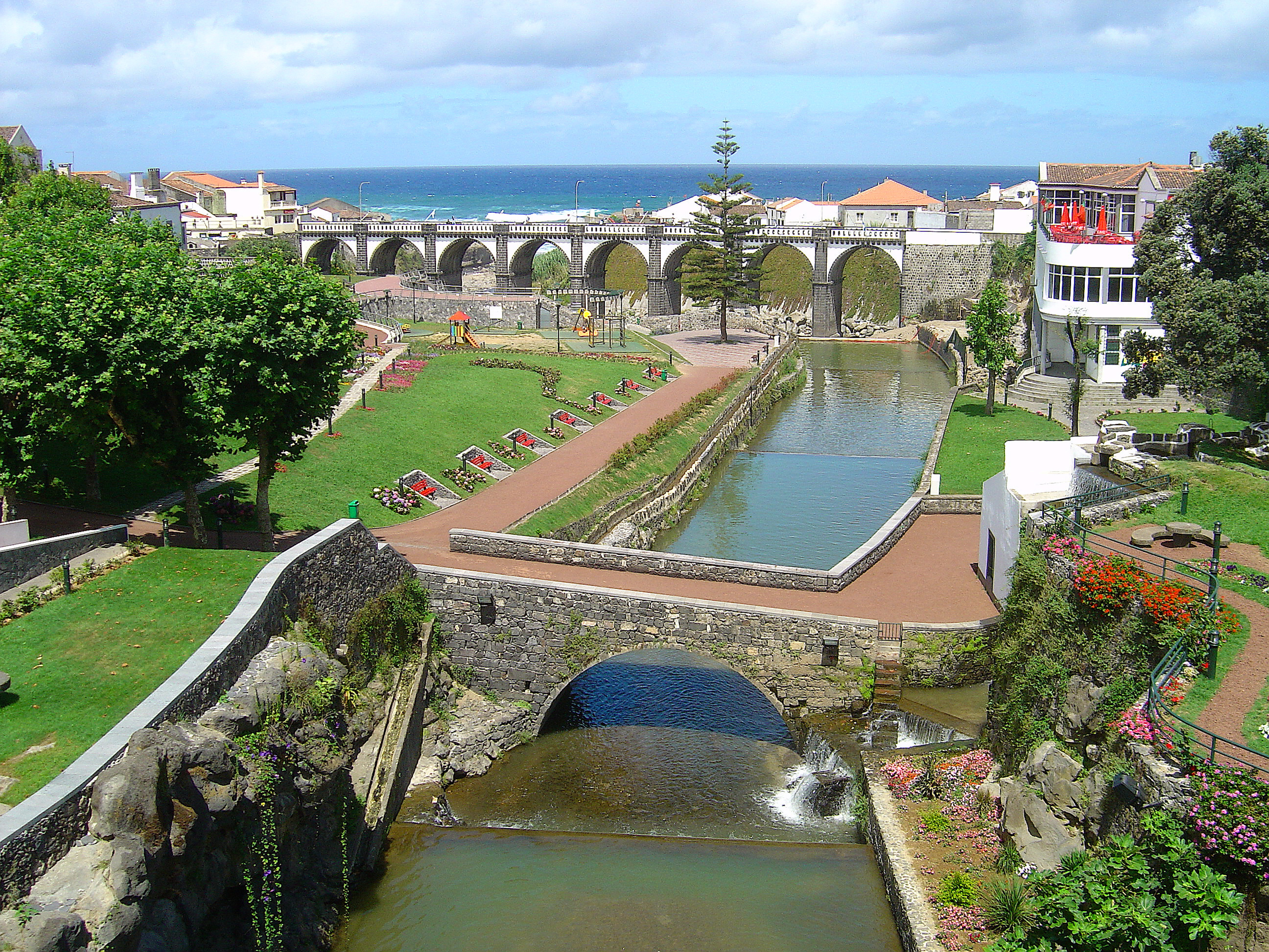 Ribeira dos Moinhos - Ribeira Grande Fotografia de Vitor Oliveira, que faz parte da colecção com o endereço